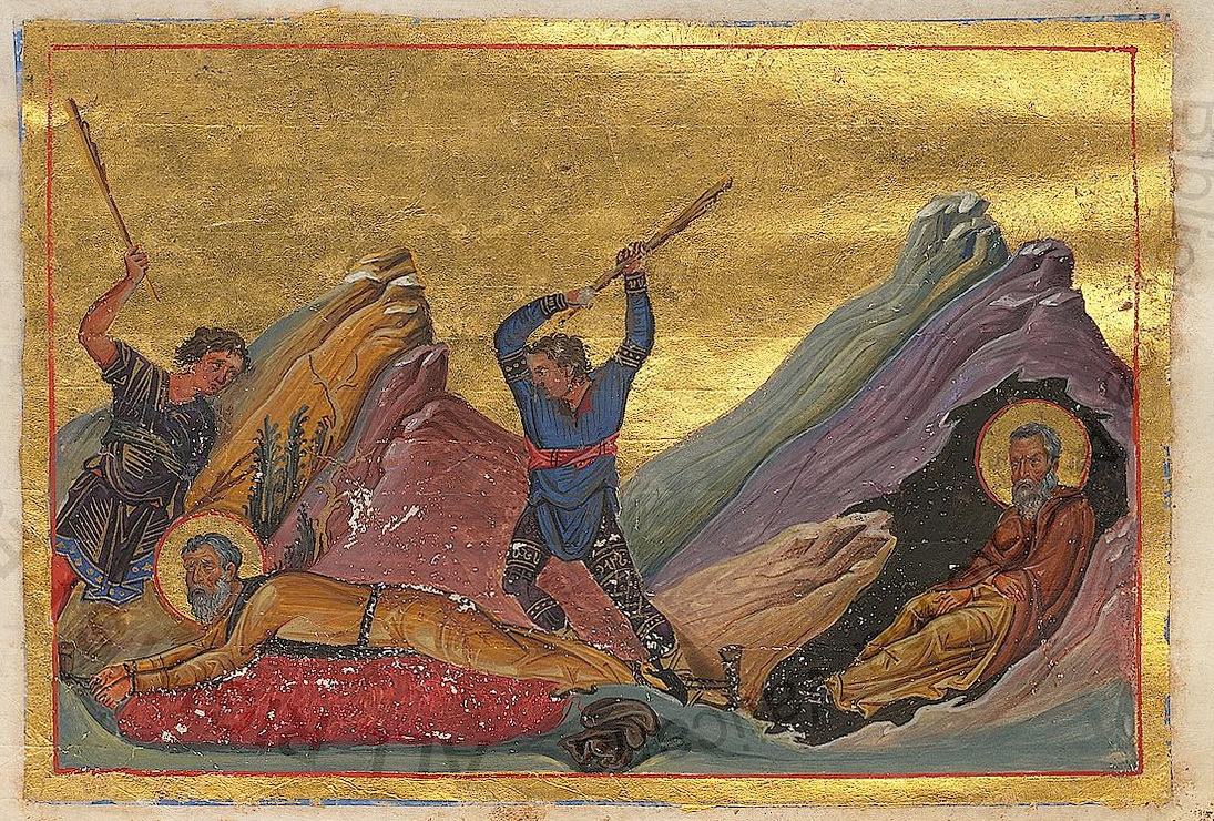 Прп. Харитон Исповедник. Константинополь. 985 г. Миниатюра Минология Василия II. Ватиканская библиотека. Рим.